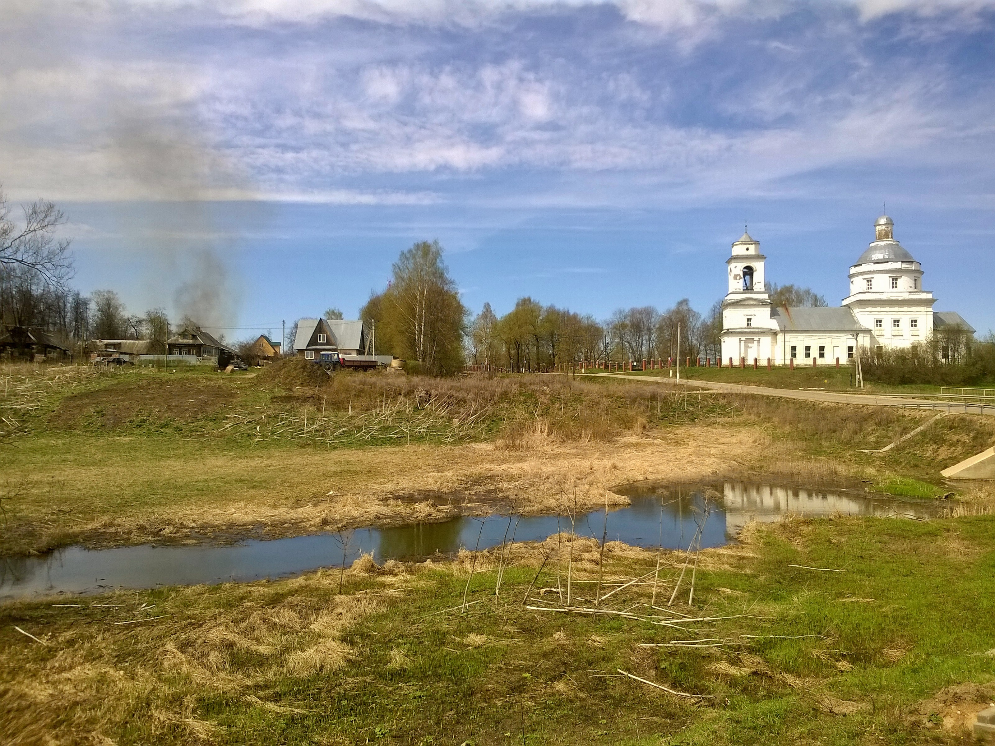 Село Белая Колпь Шаховского района Московской области России. Церковь Андрея Стратилата, река Муравка. 30 апреля 2015 года.